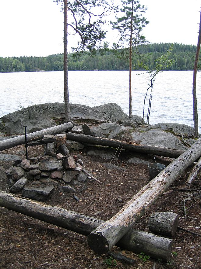 Nuotiopaikka Kuhmoisten Isojärven rannalla, Isojärven kansallispuiston alueella. Kesä 2003. Huom: Muista säilyttää viittaus kuvaajaan, mikäli käytät kuvaa.